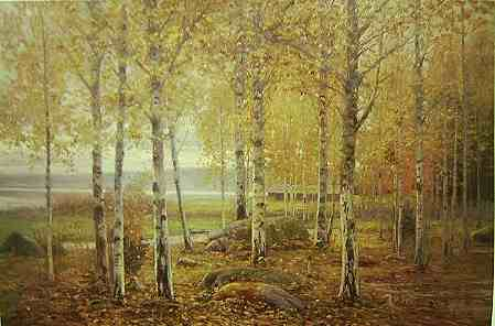 painting